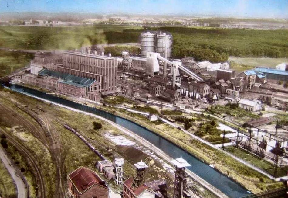 La fosse Thiers de la Compagnie des mines d'Anzin était un charbonnage constitué de deux puits situé à Saint-Saulve, Nord, Nord-Pas-de-Calais, France.